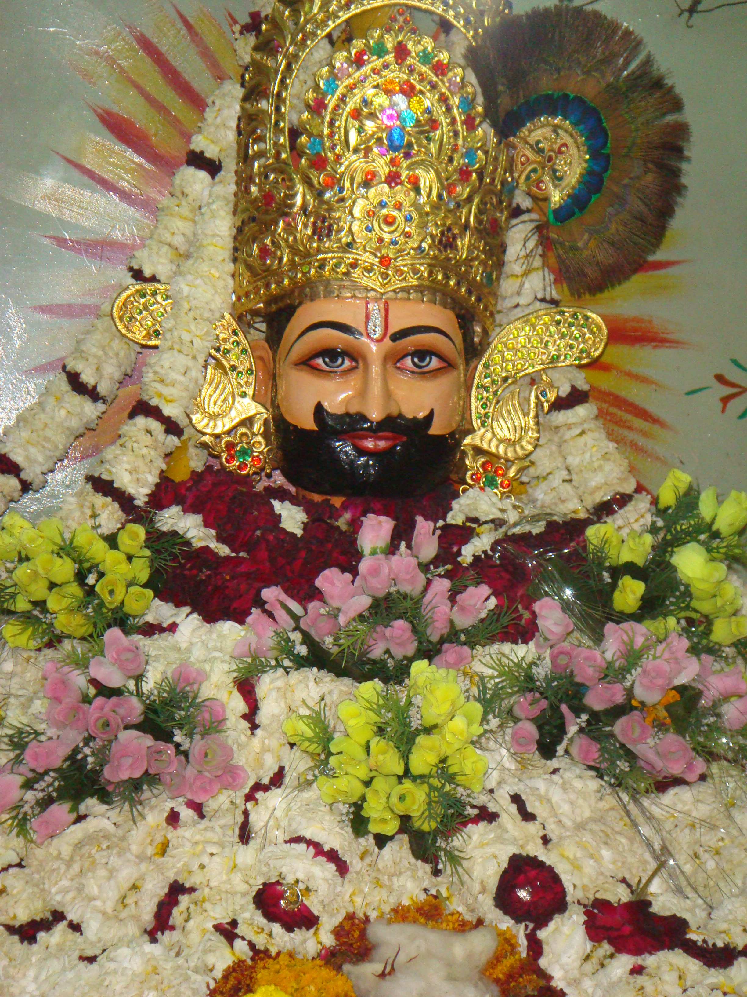 Khatushyamji Rath idol during Pad Yatra 2008 from Kota to Khatushyamji